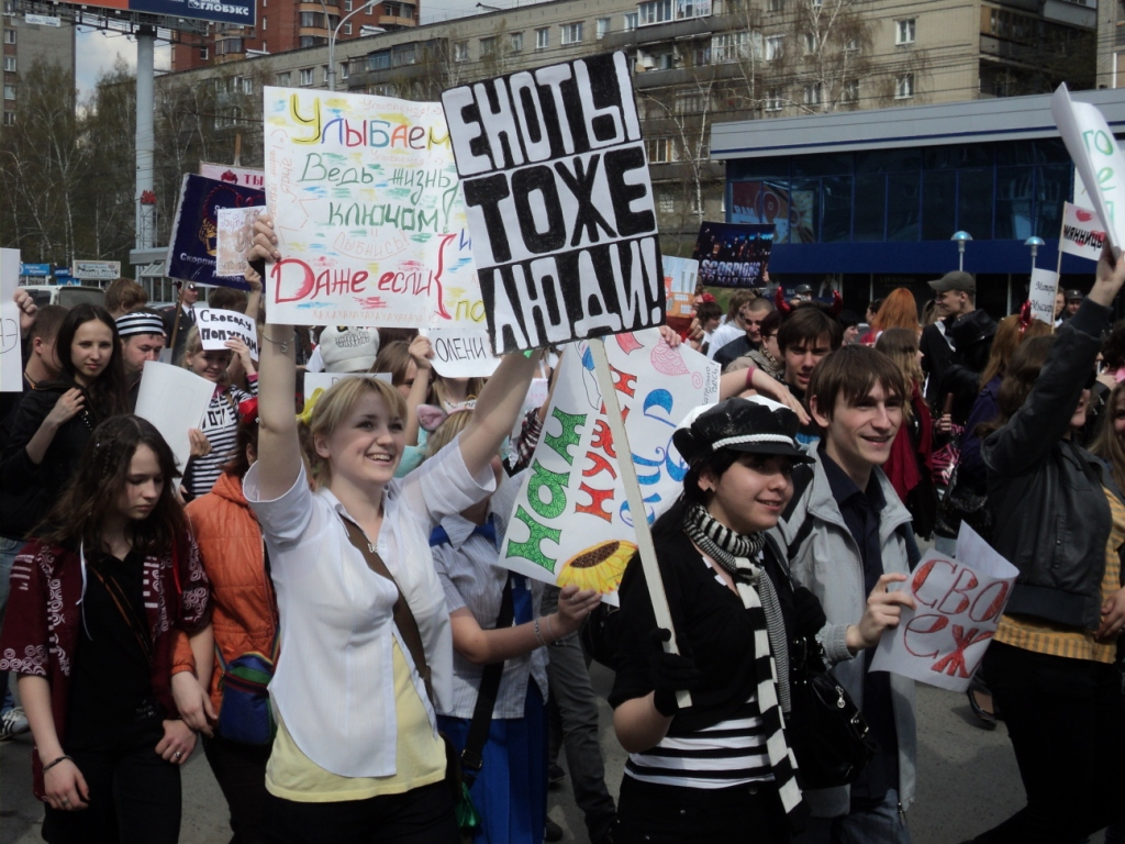 "Монстранты" с самодельными плакатами на улице Красный проспект/ Particiants of Monstration with their self-made absurd announcements in hands